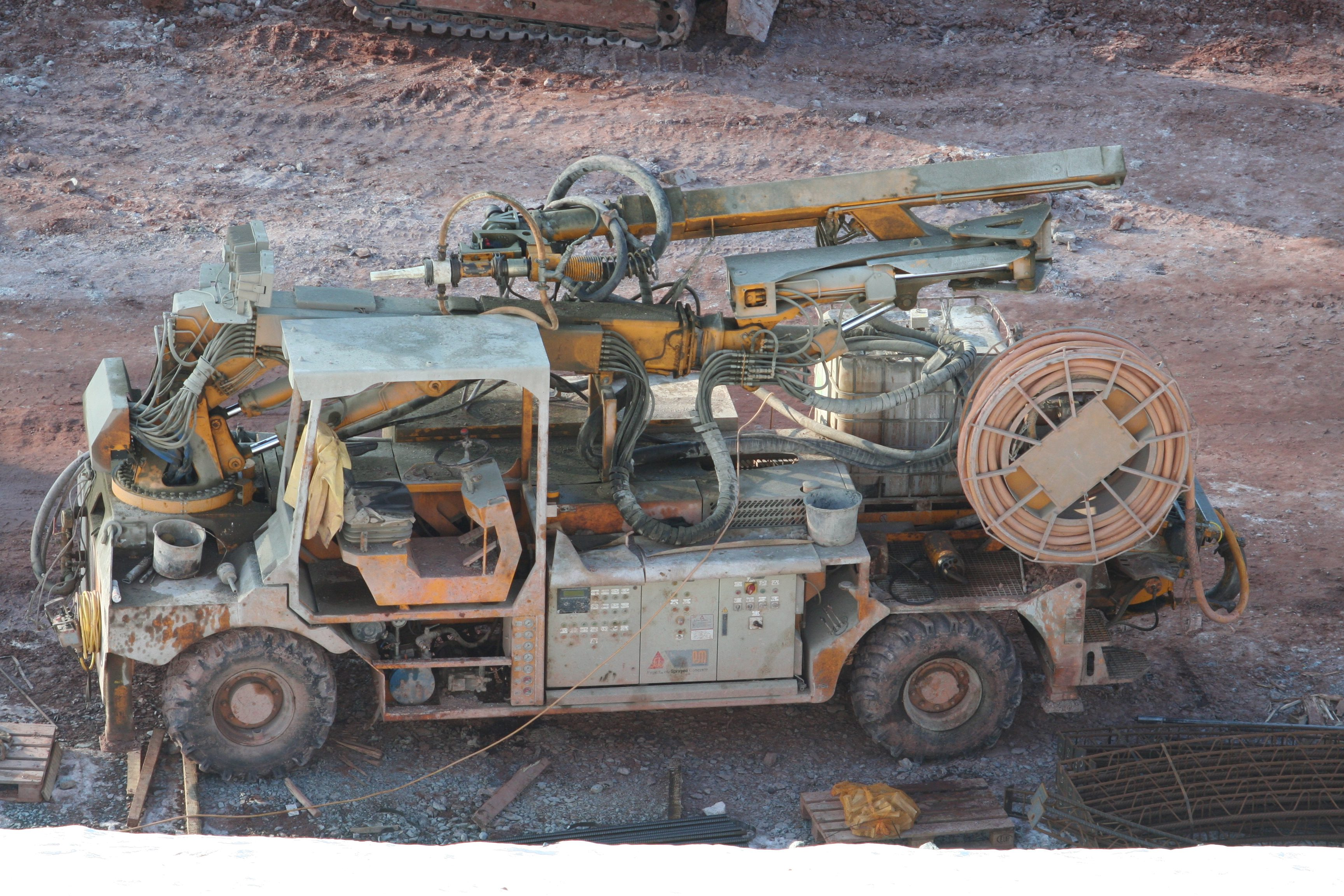 Spritzbüffel für Spritzbetonschale im Tunnelbau am Tunnel Müß